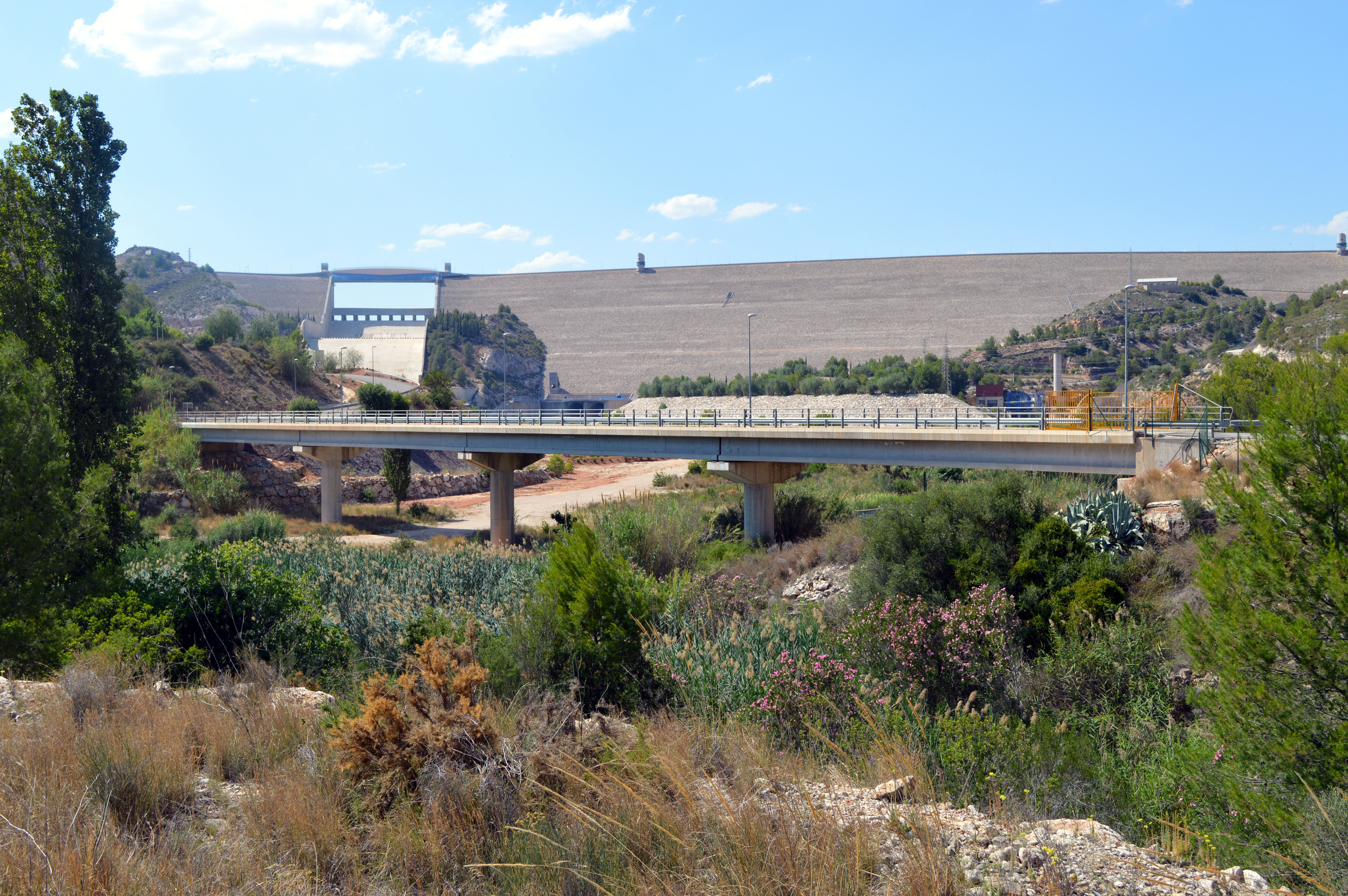 Presa de Tous